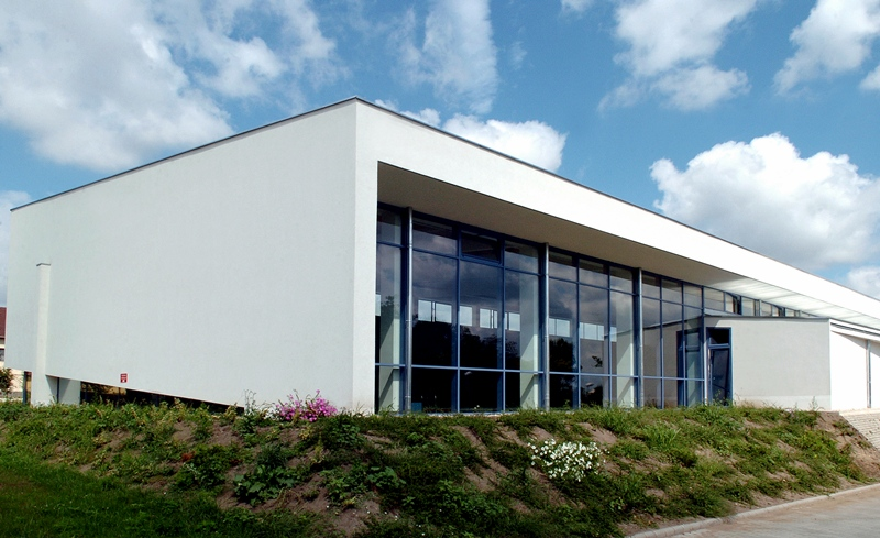 Újfehértó